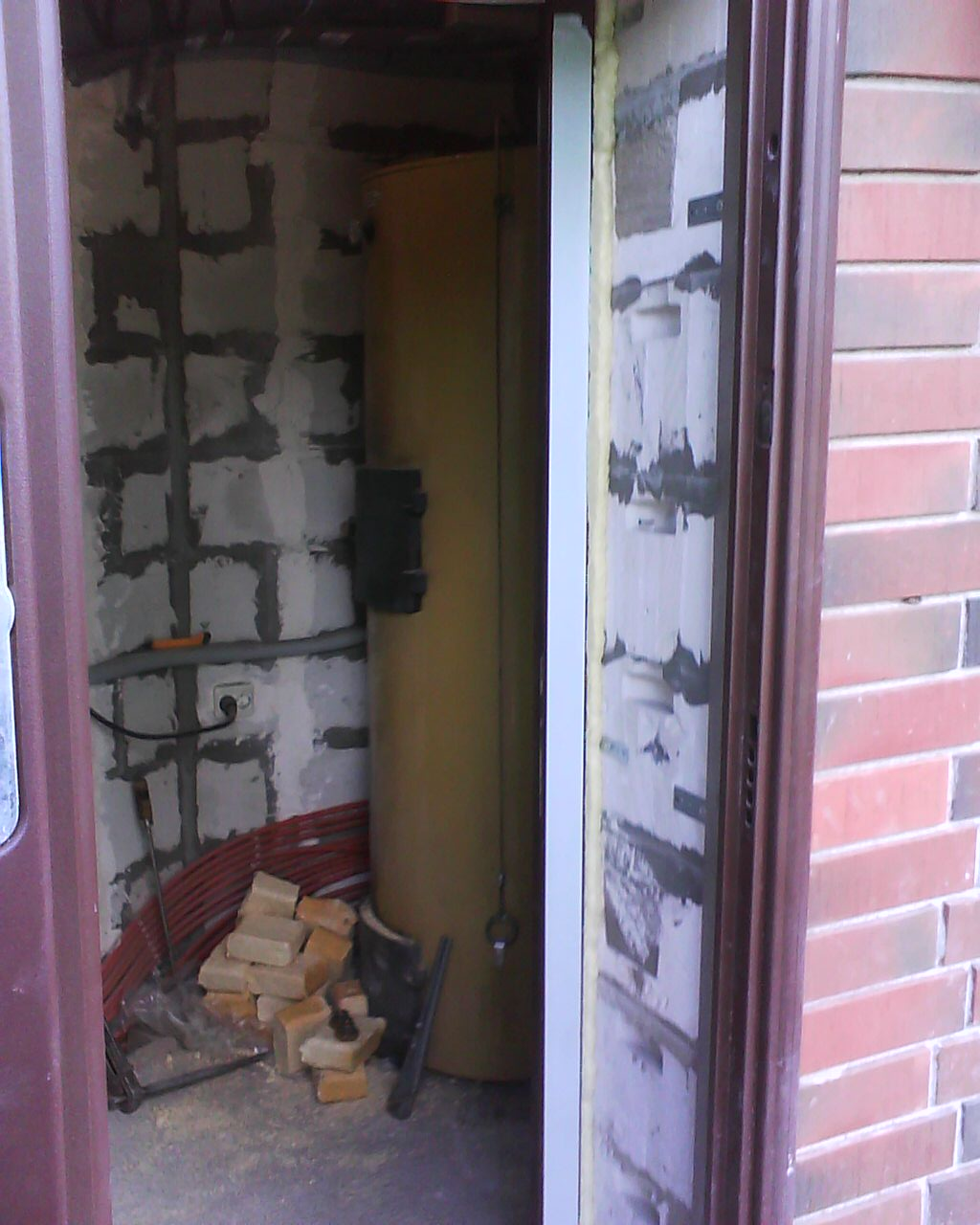 Передняя часть котла Stropuva s25 (видна через дверь котельной) с кучей опилочных брикетов